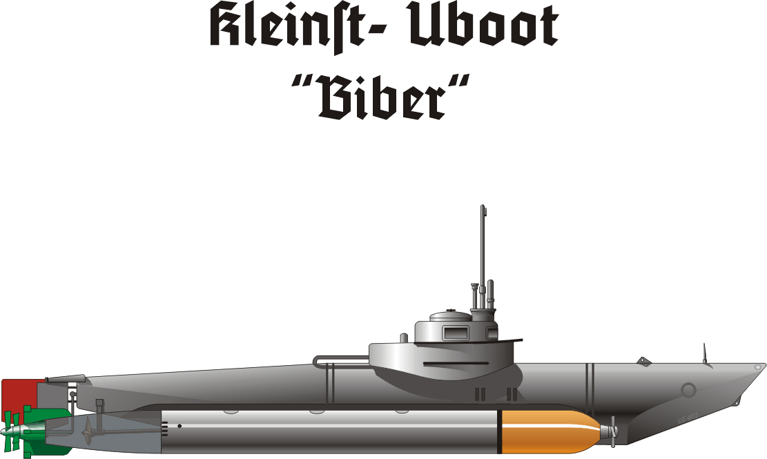 Zeichnung (Corel); Uwe Ernst